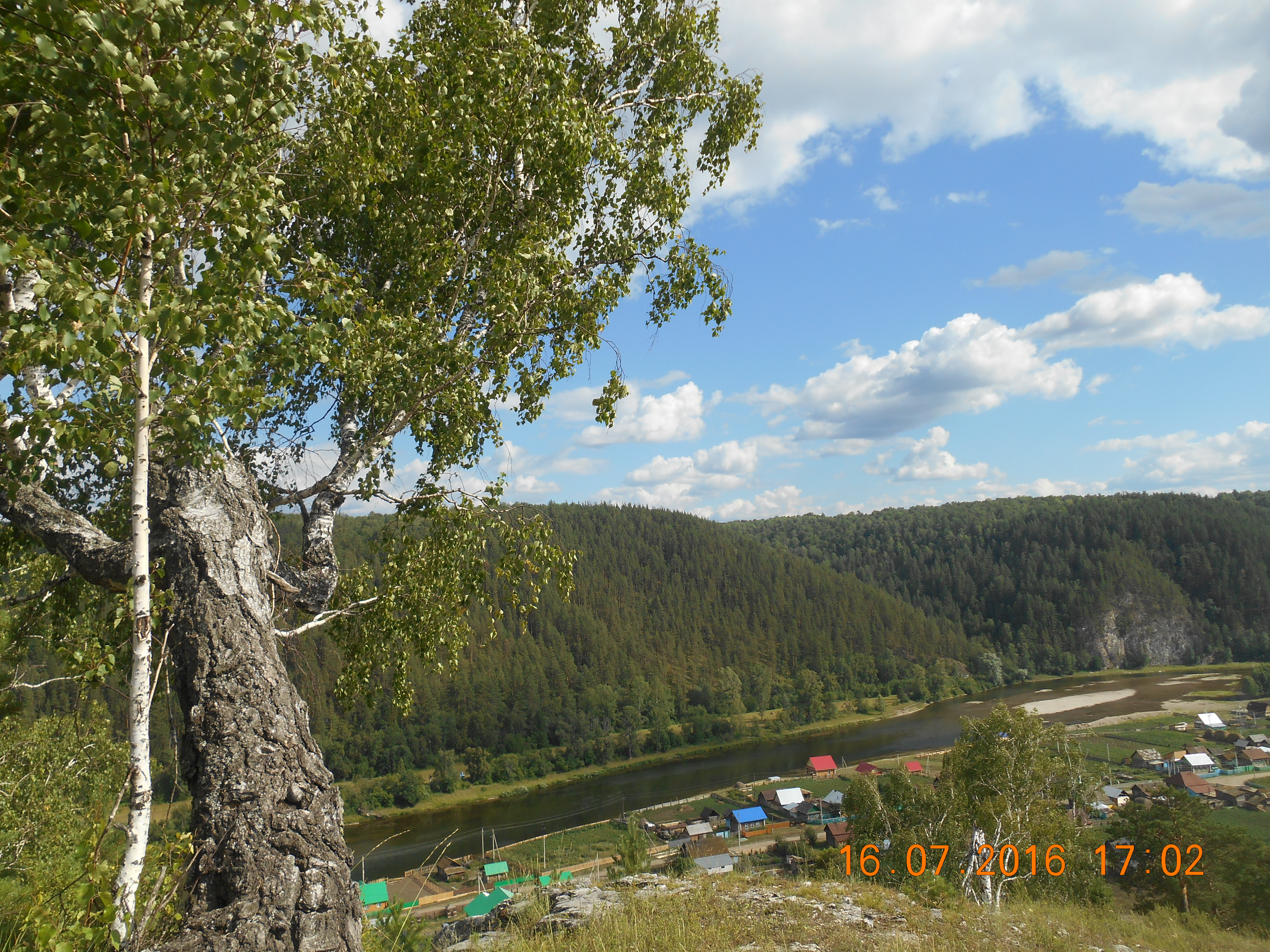 Башҡортса: Мендәғол ауылы Бөрйән районы